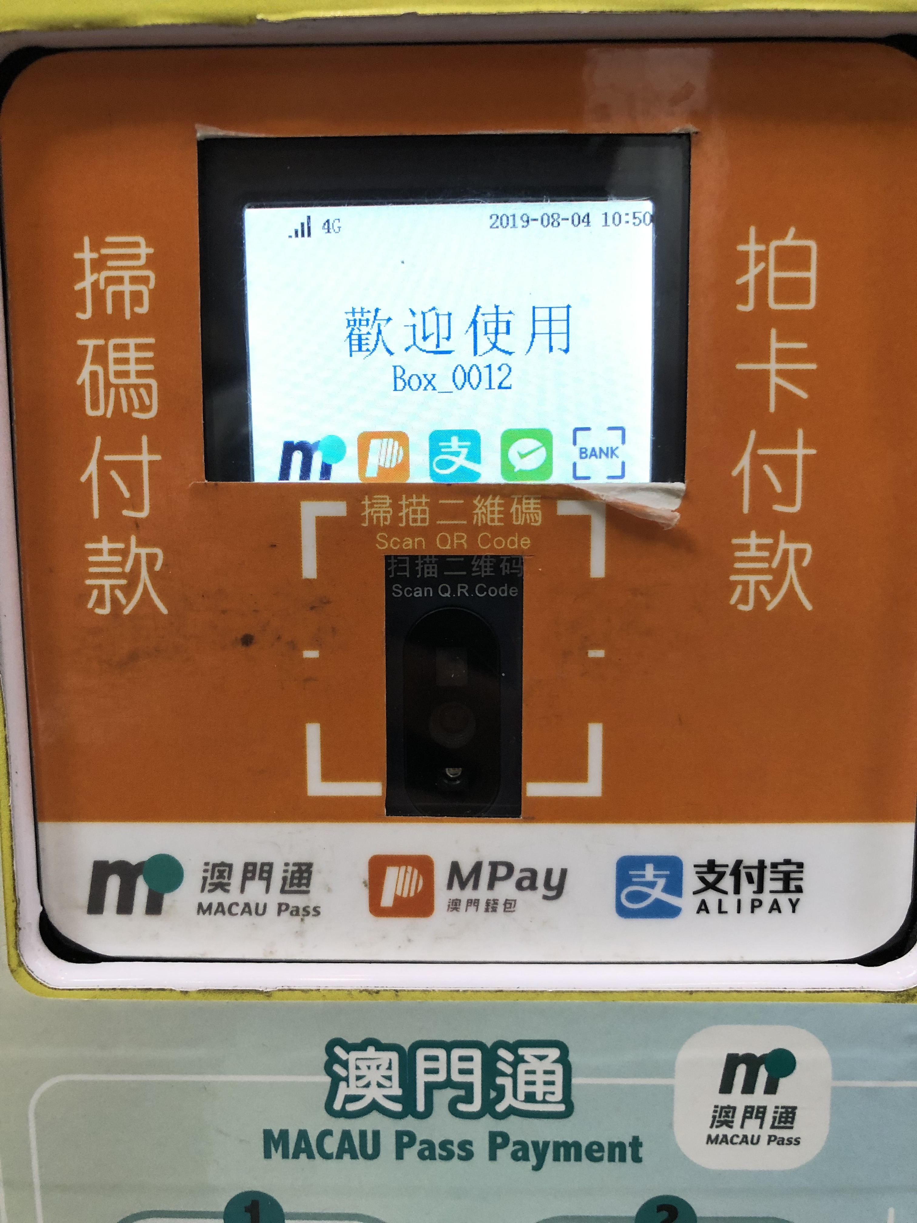 澳門通新款自動販賣機付款感應端，接受支付寶、微信支付、澳門通卡、澳門錢包掃瞄二唯碼付費。